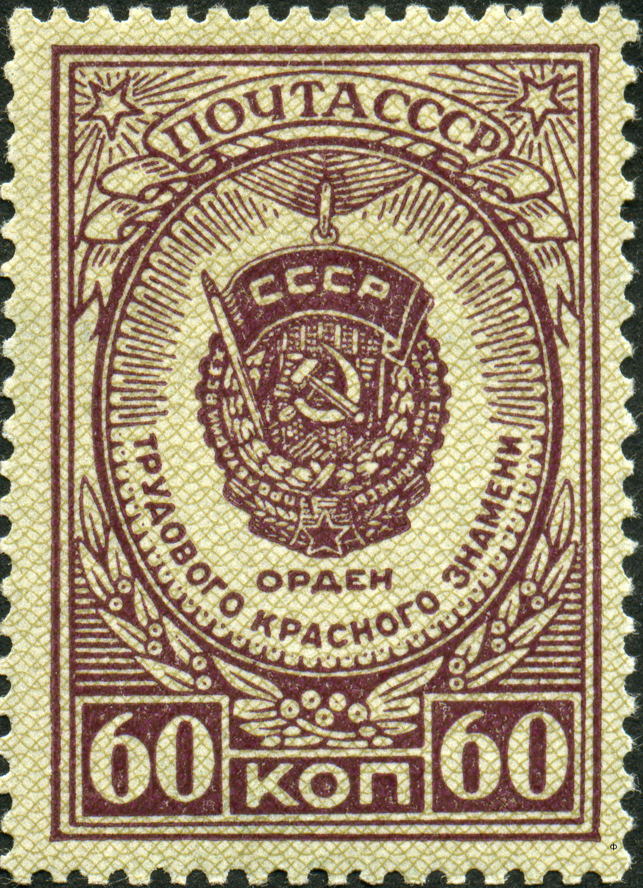 Марка СССР